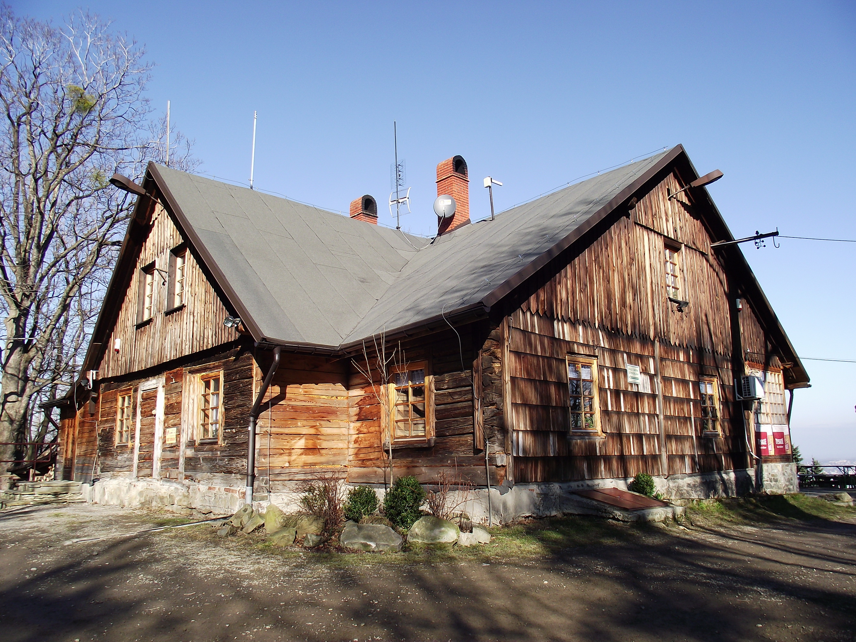 Schronisko PTTK Dębowiec - widok od tyłu.